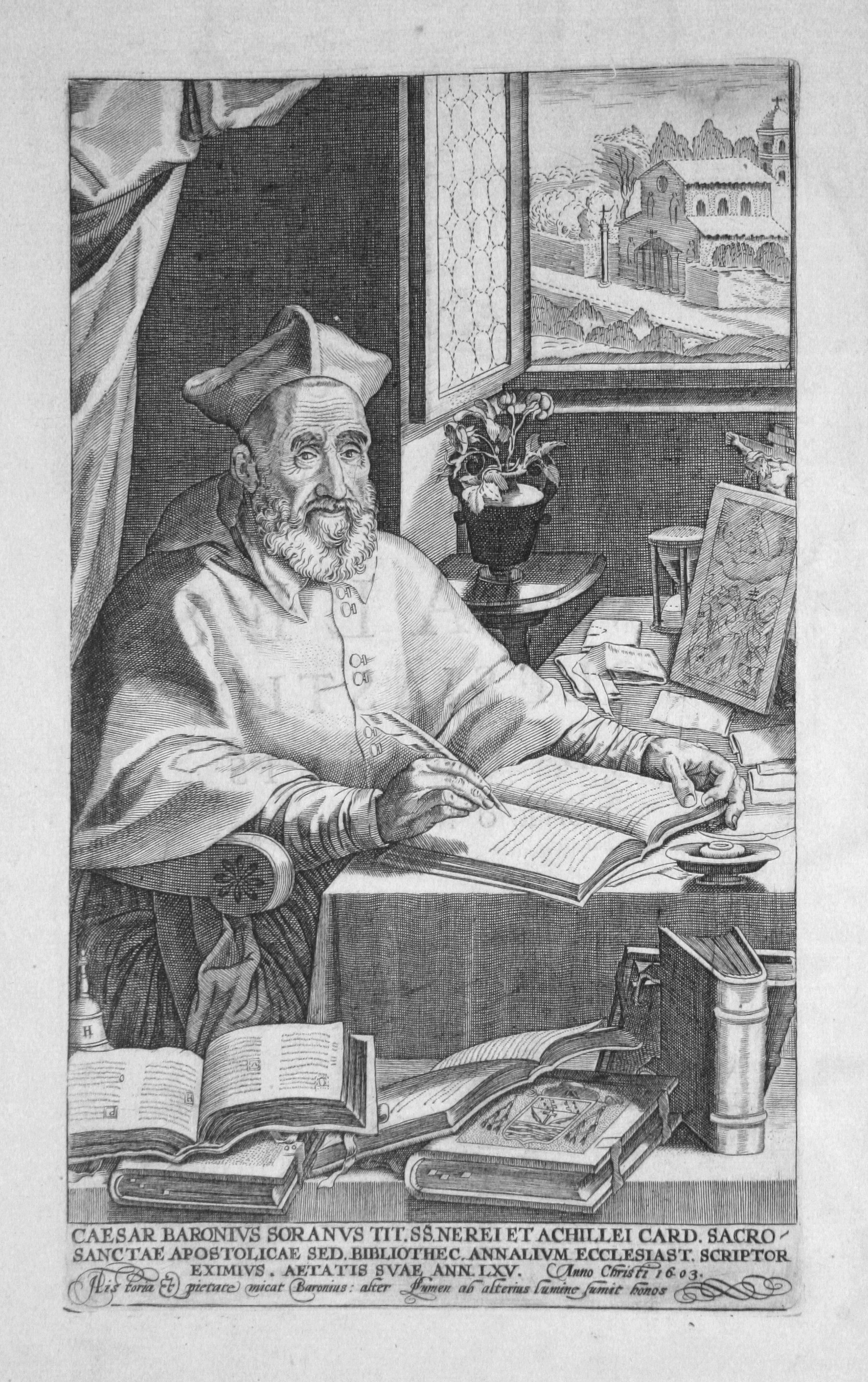 Cesare Baronius